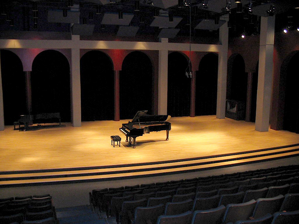 Scène de la salle Henri-Gagnon. Faculté de musique - pavillon Louis-Jacques-Casault, université Laval, Québec, Canada.